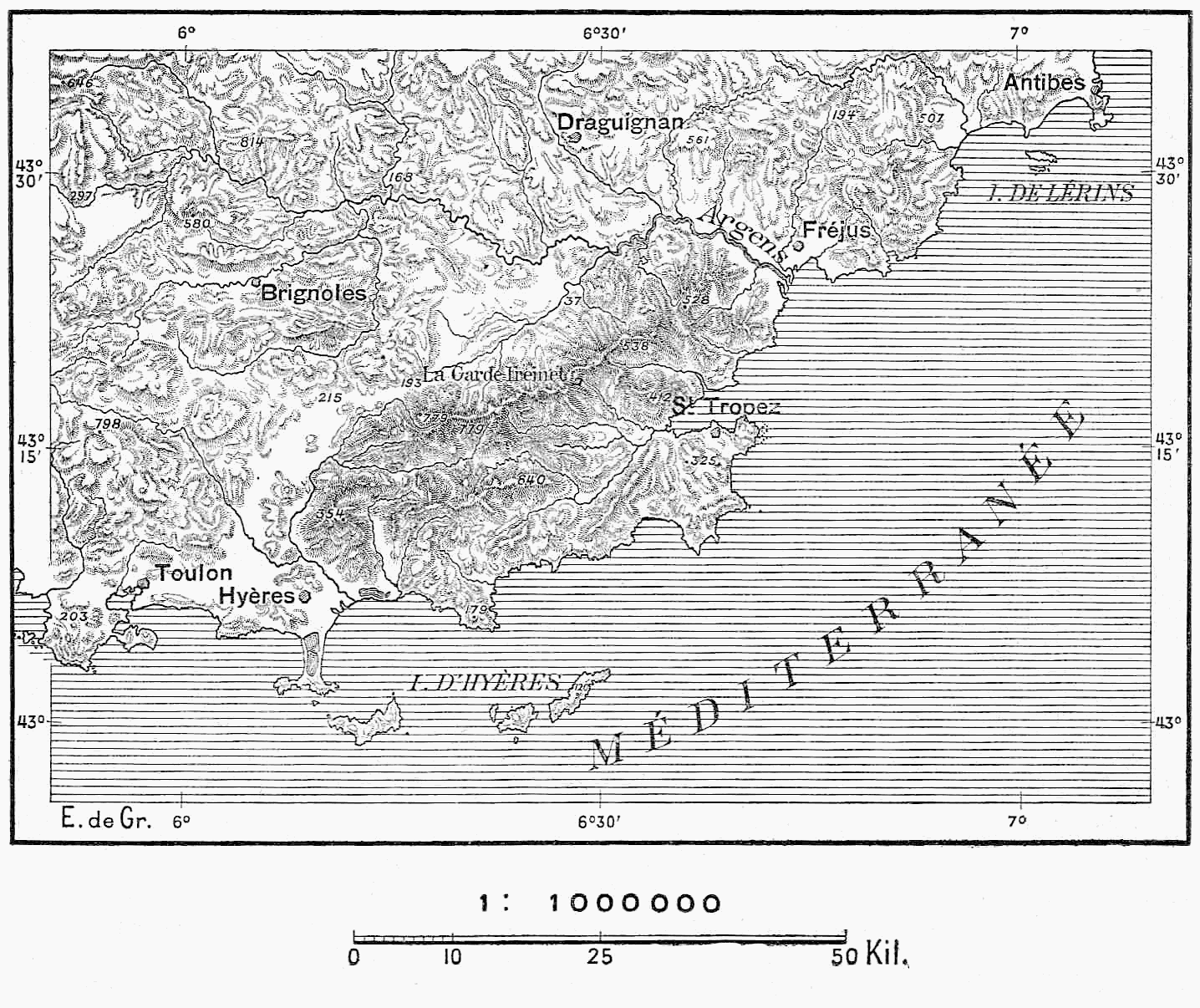 Montagnes des Maures